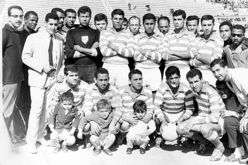 Équipe vainqueur du 3ème championnat de Tunisie